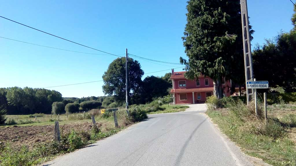 Vista do Penedo-Rendal, Curtis.